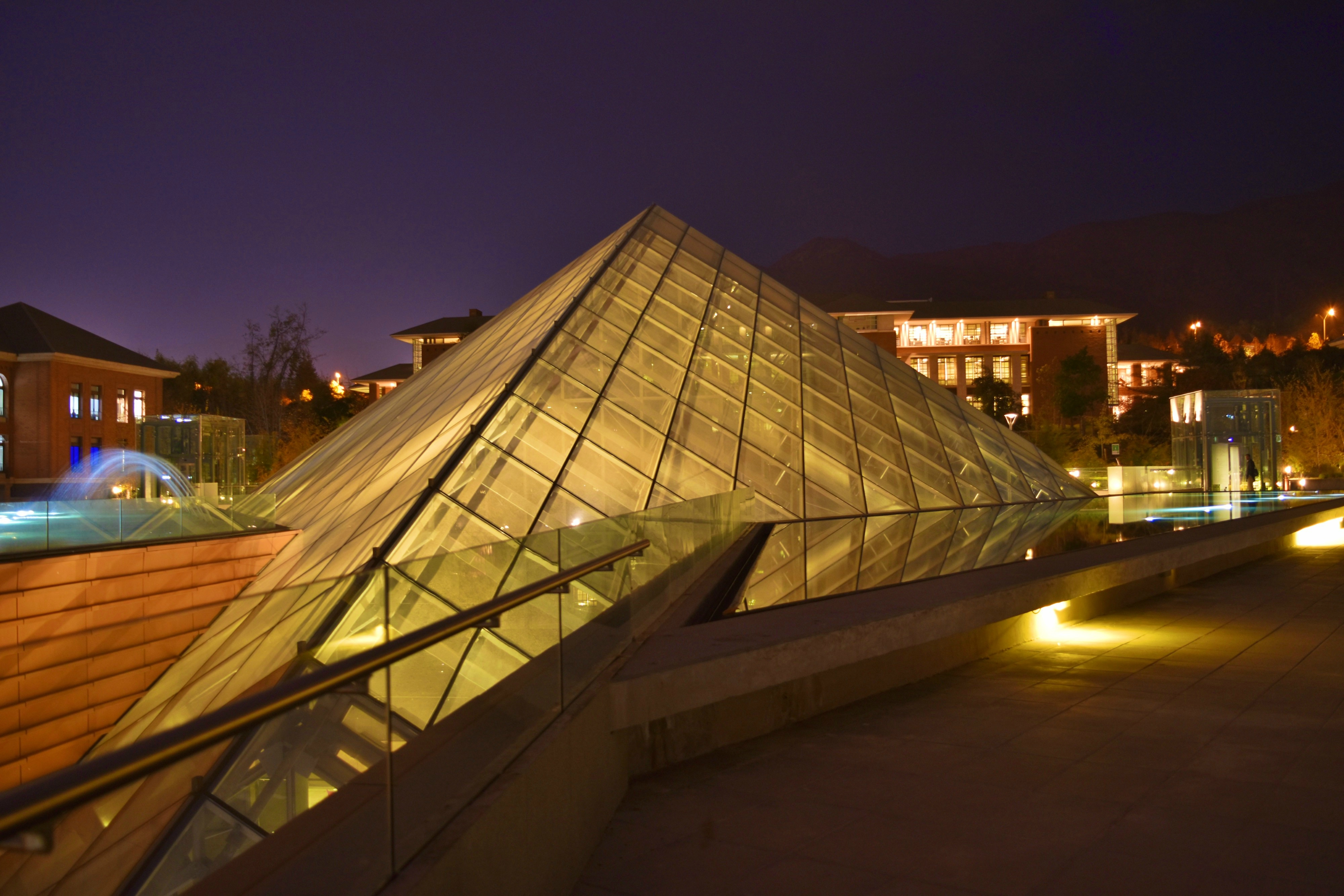 Toma nocturna del Edificio Central